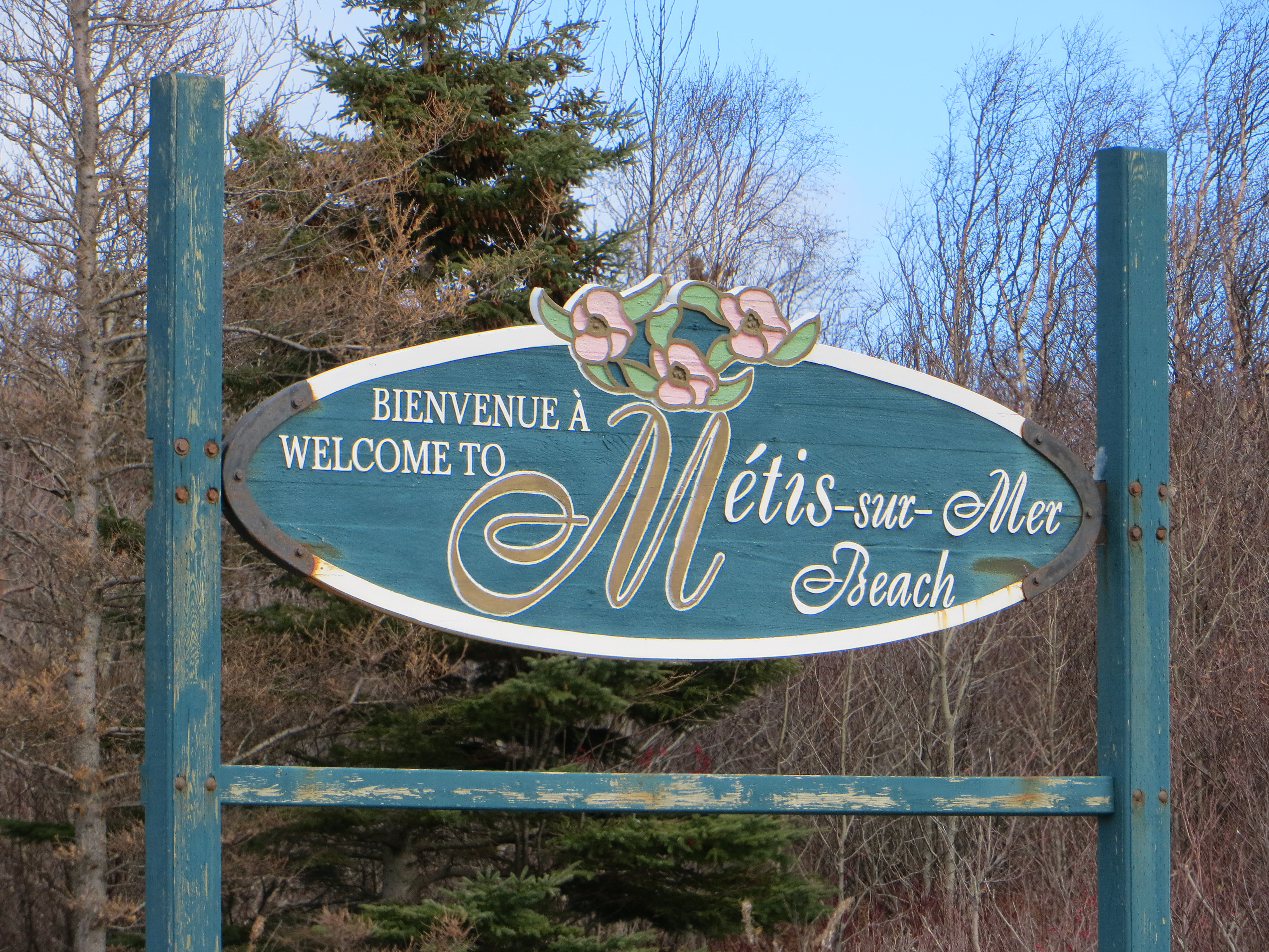 Aviso de bienvenida de Métis-sur-Mer.